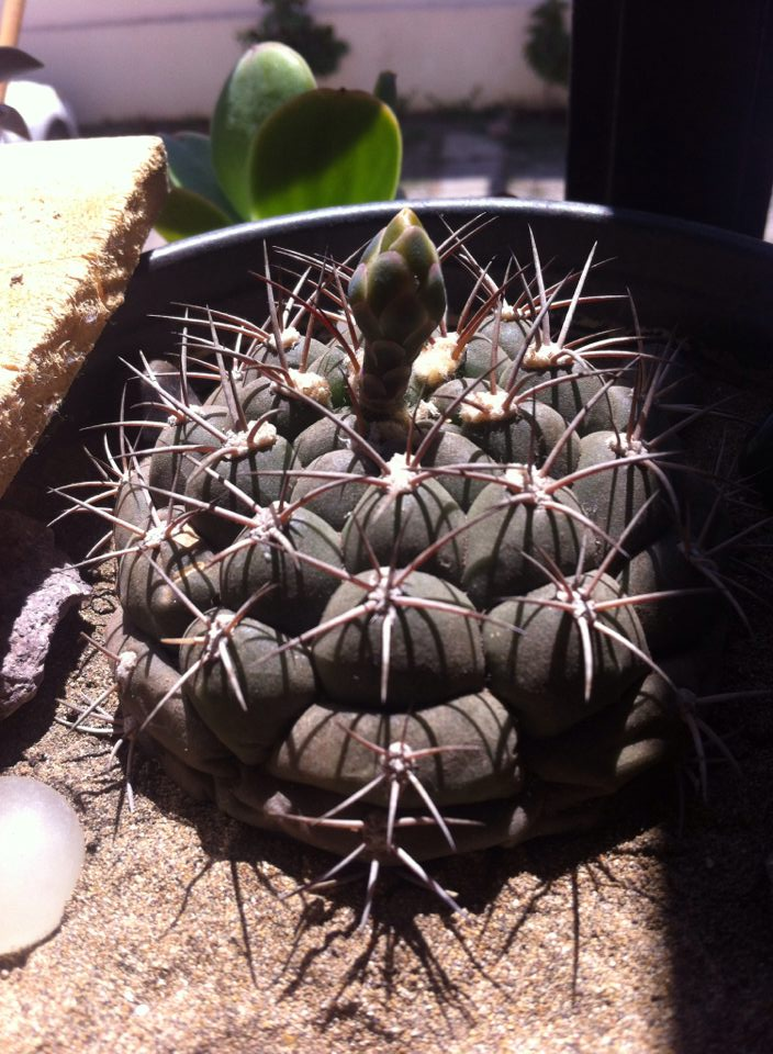 Cactus de forma globosa del genero Gymnocalycium, cuenta con un conjunto de 7 espinas de hasta 2.5 centímetros.